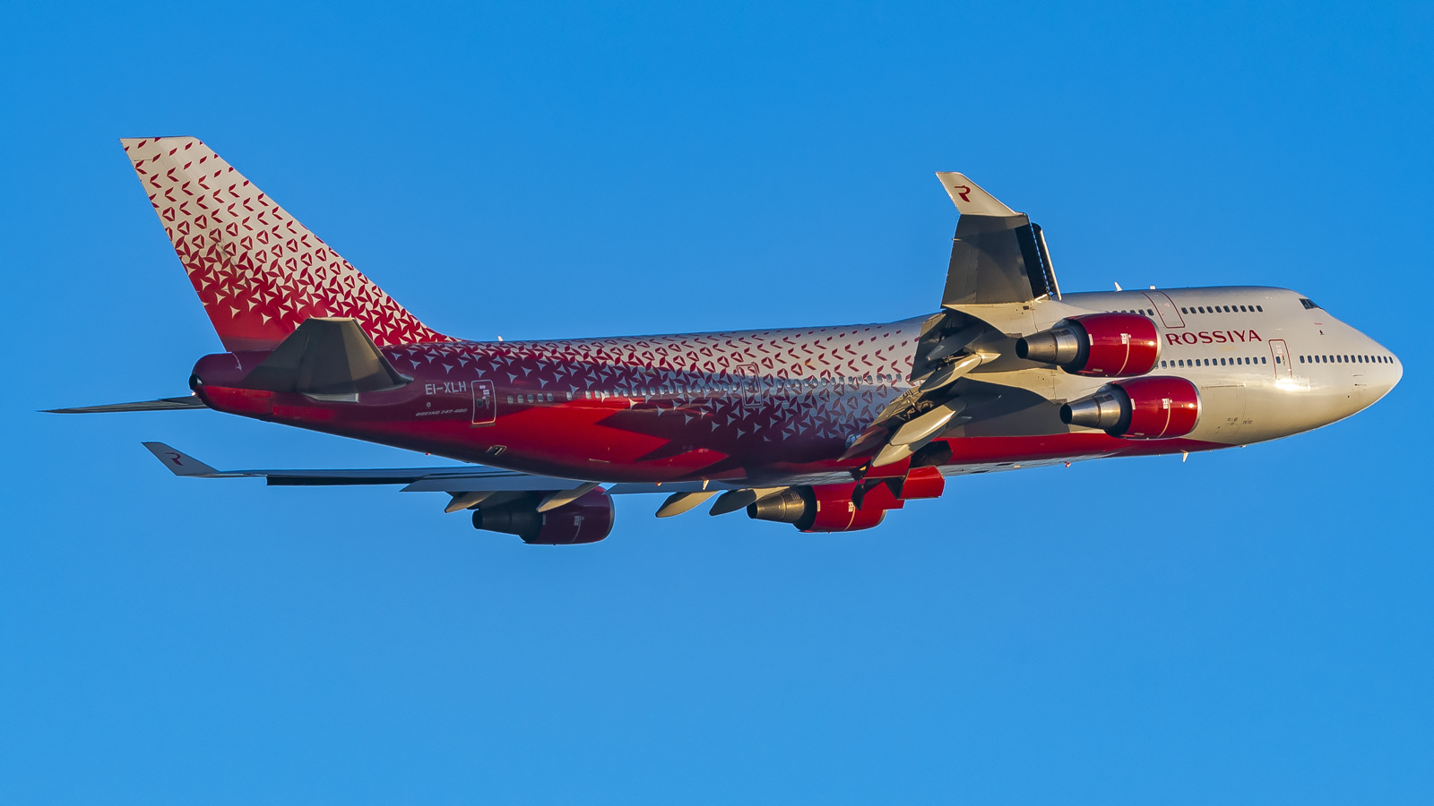 EI-XLH Boeing 747-400 Rossiya Airline VKO | UUWW